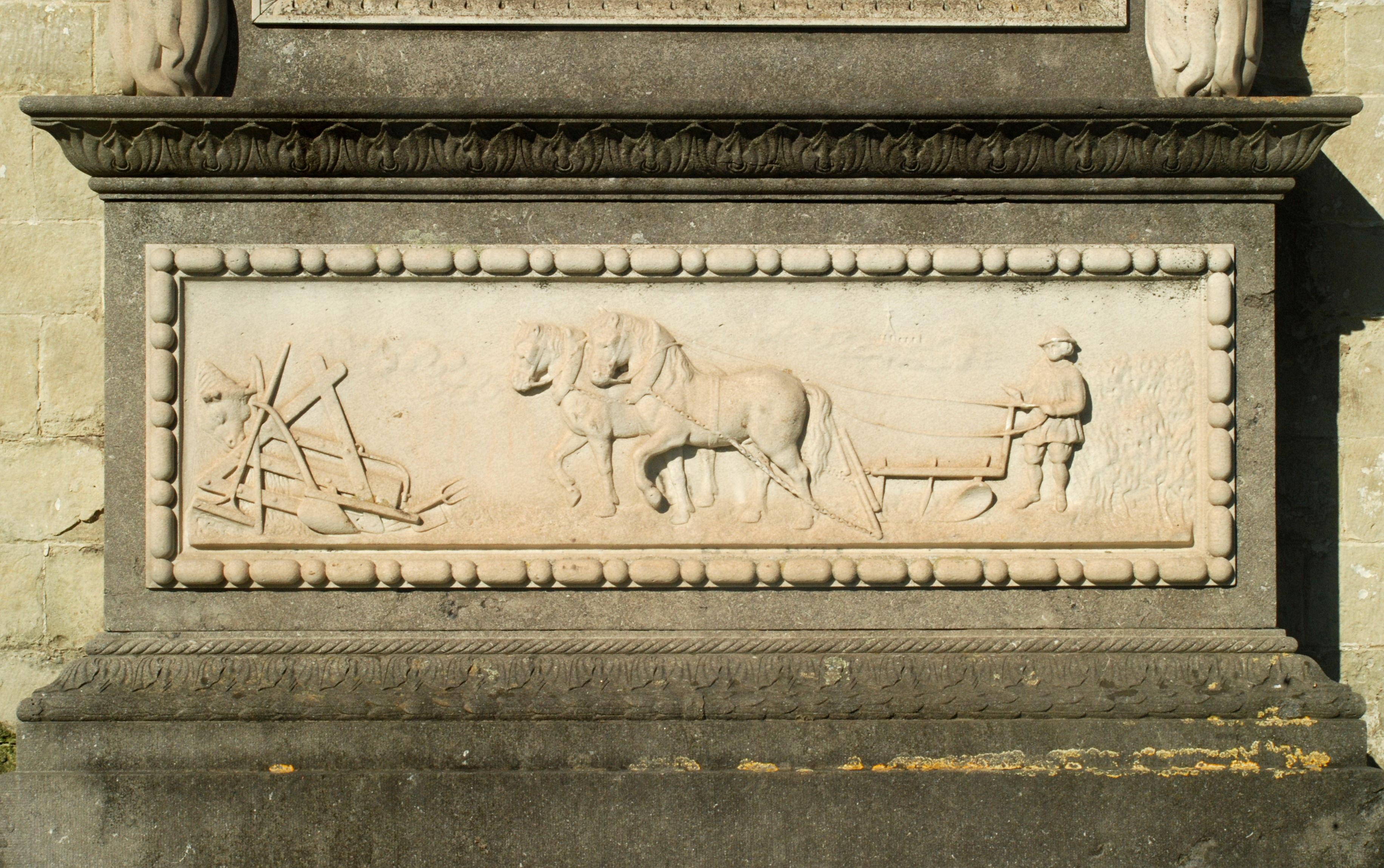 Belgique - Brabant wallon - Nivelles - Eglise Sainte-Marguerite de Thines